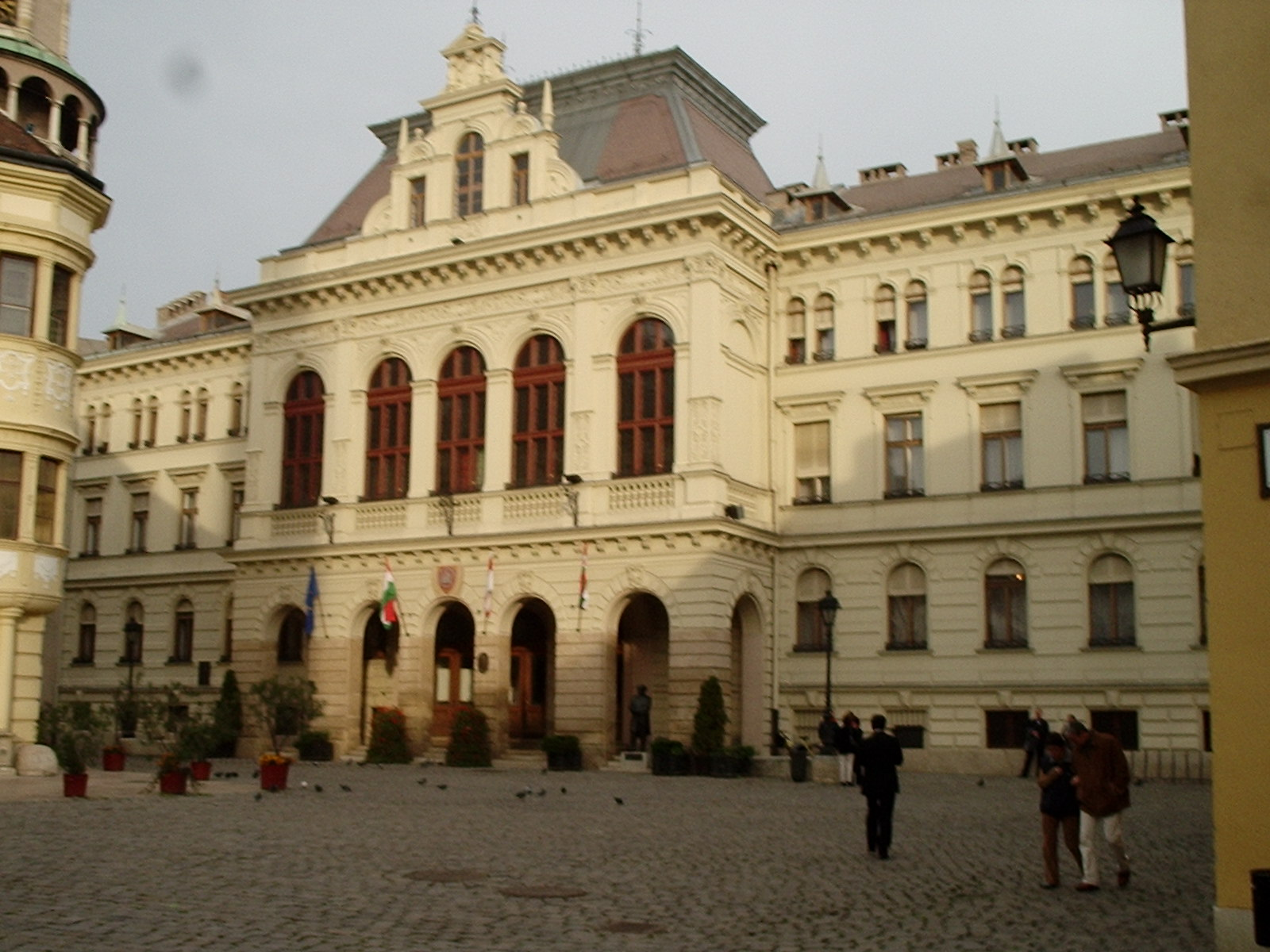 Sopron, Városháza